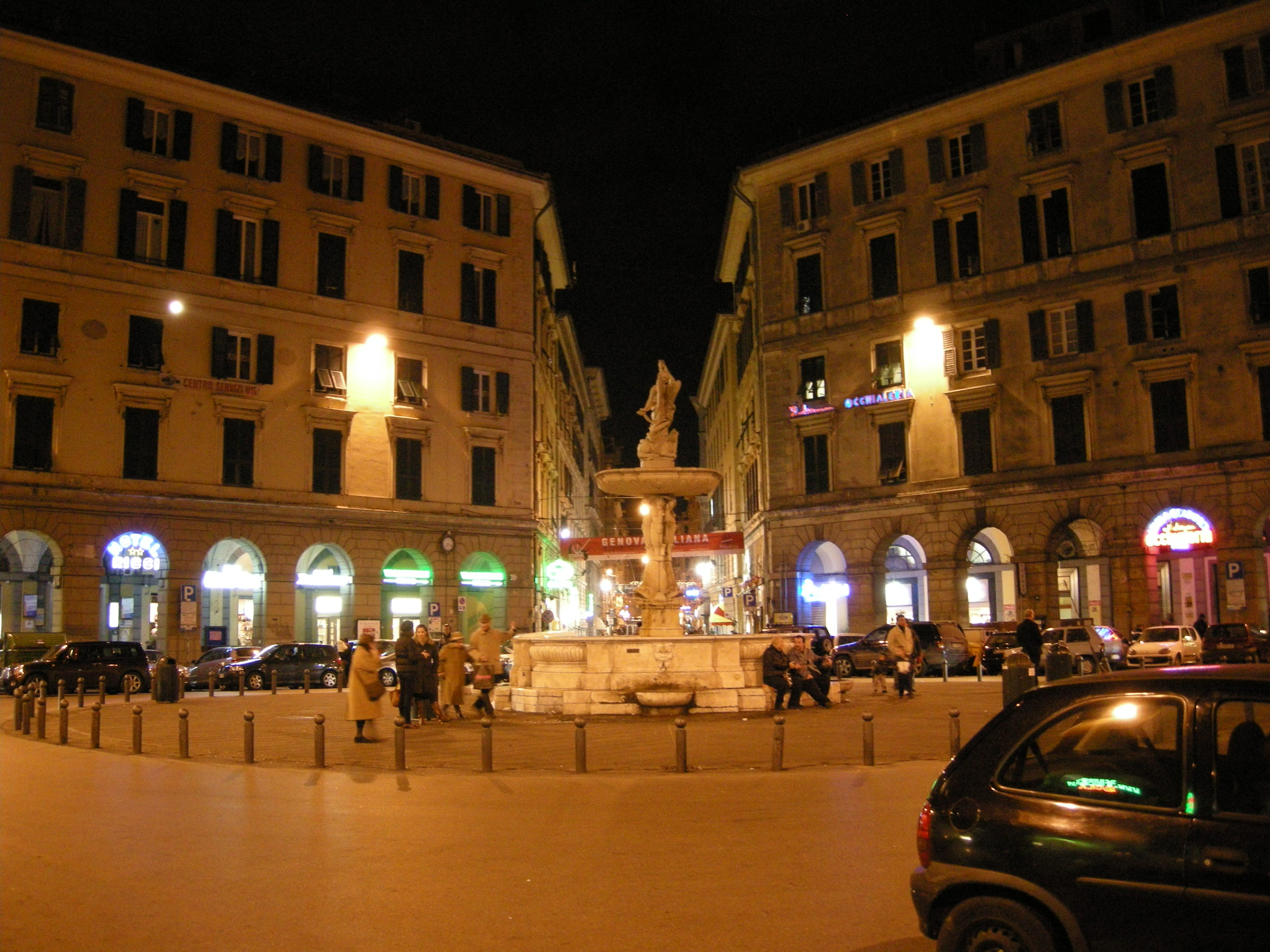 Genova, piazza colombo di notte